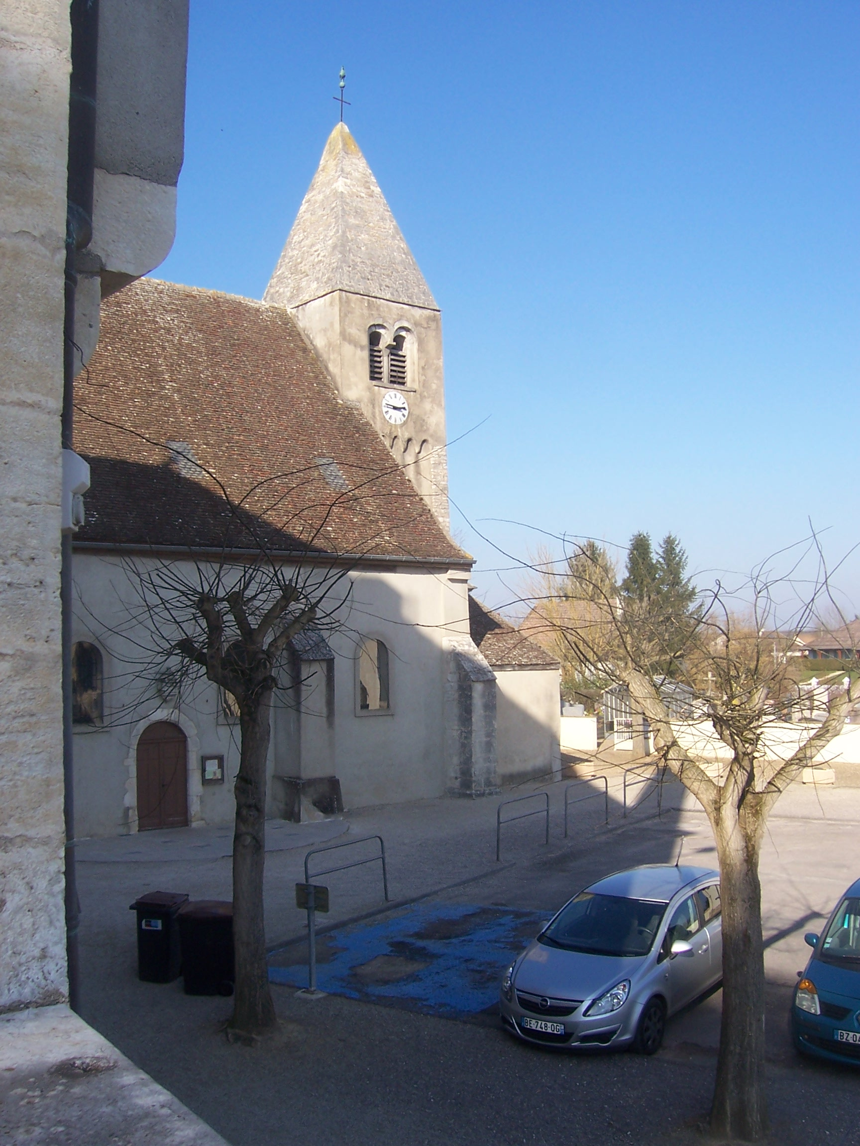 Eglise de Sassenay (Bourgogne)